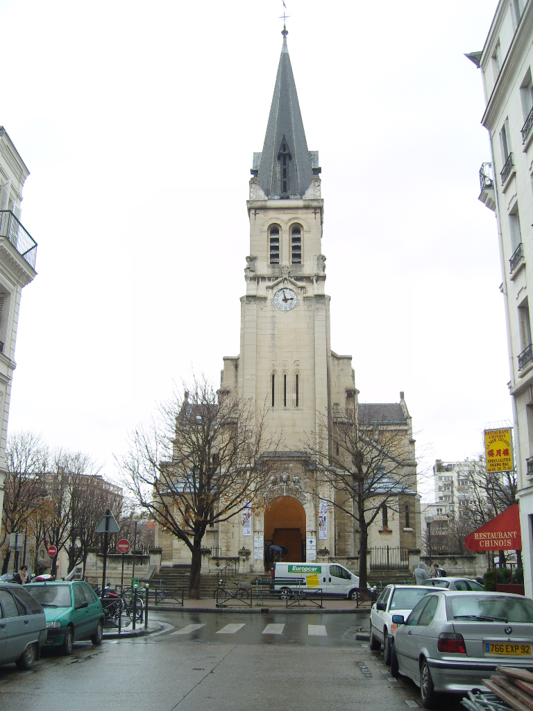 Paris 15e, église Saint-Lambert_de_Vaugirard, vue_générale 1